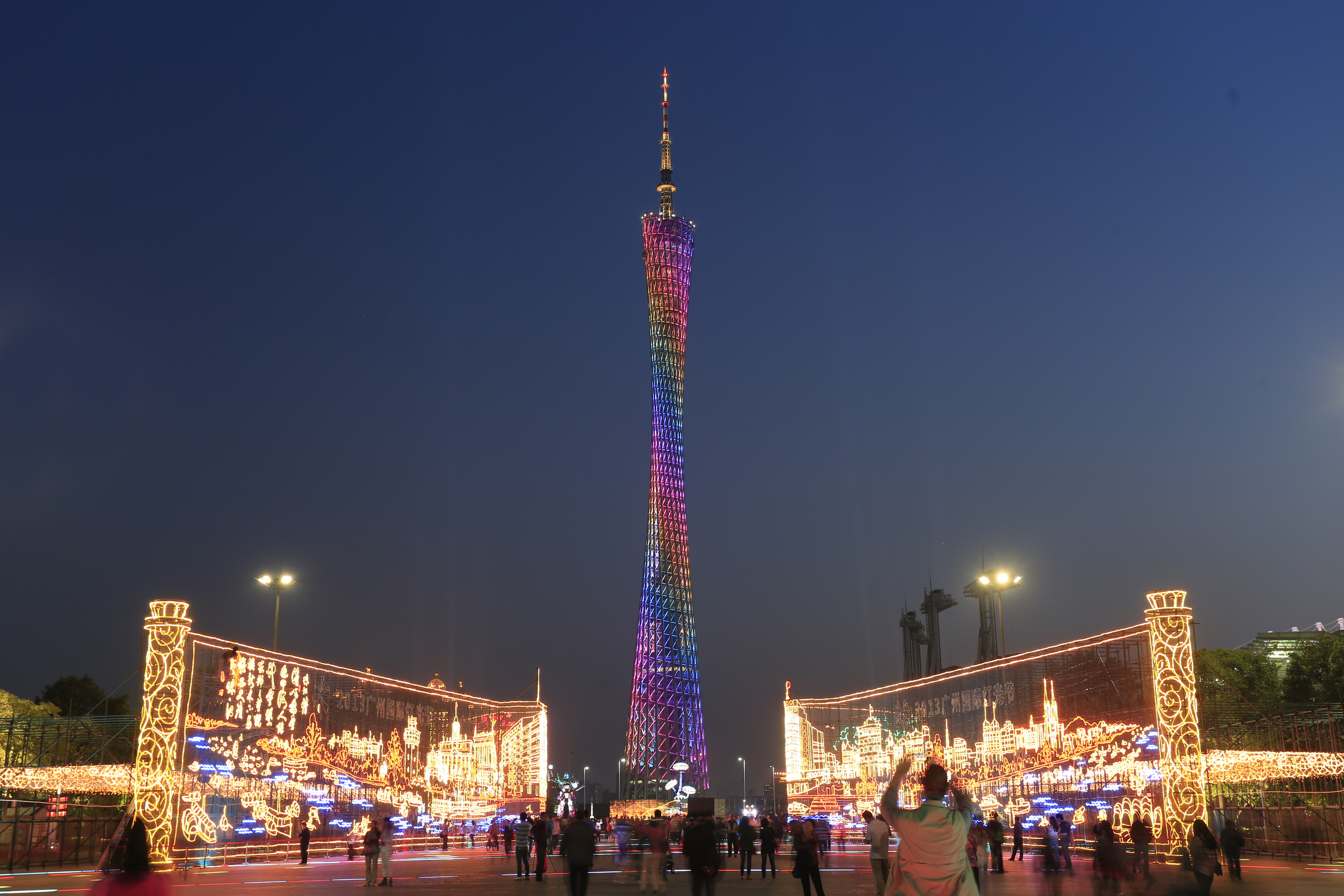 广州塔